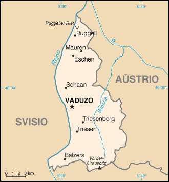 Mapo de Liĥtenŝtejno, priskribo en Esperanto